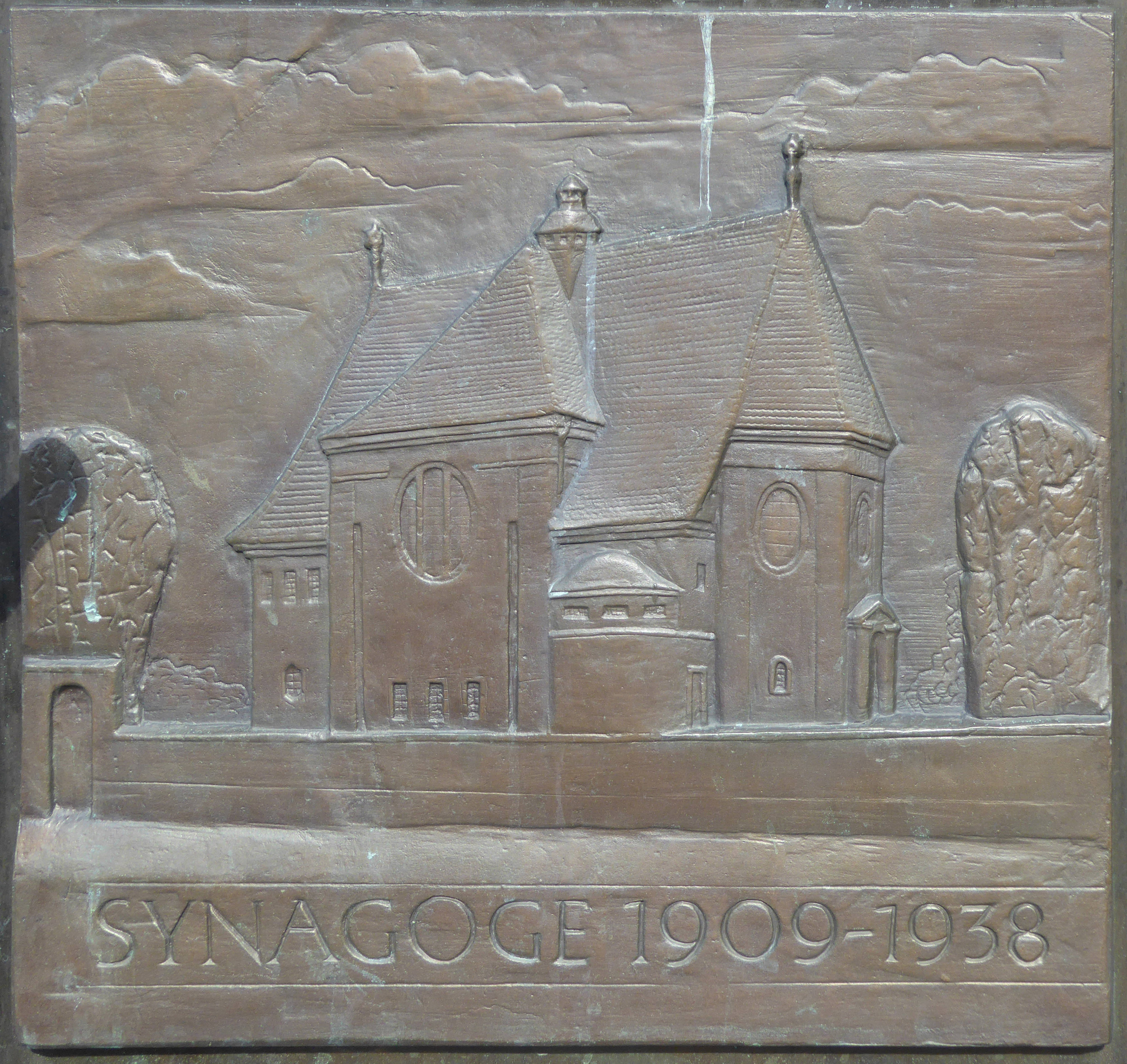 Gedenkrelief für die zerstörte Synagoge am Schweizerberg in Memmingen